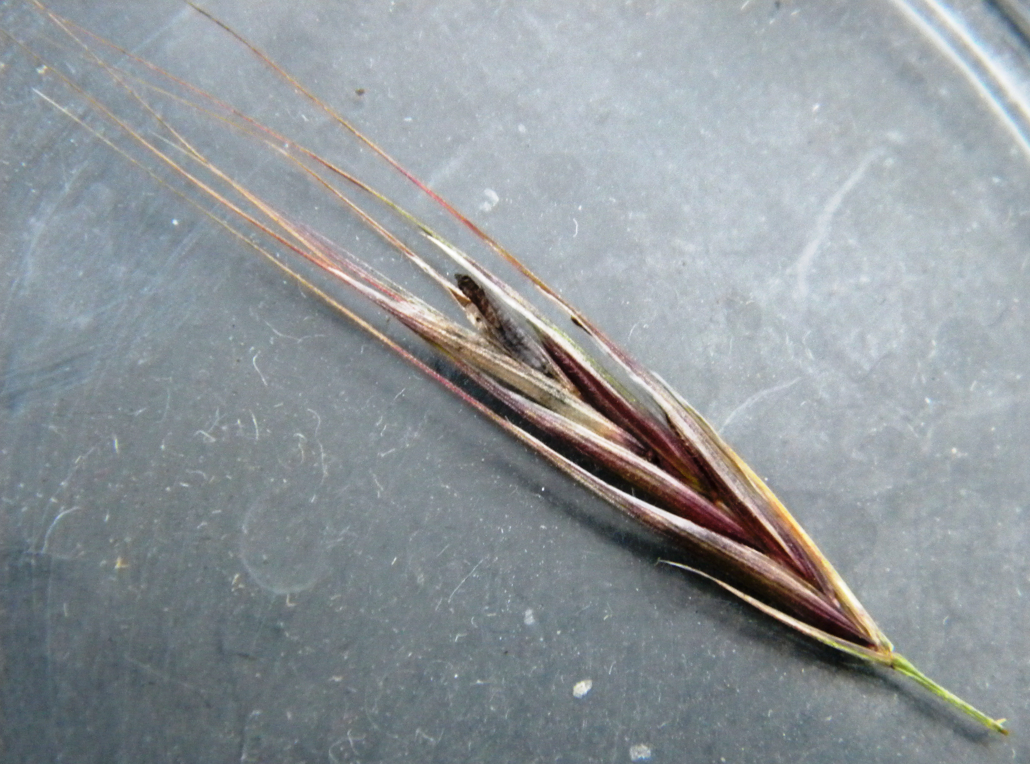 Ergot sur brome stérile